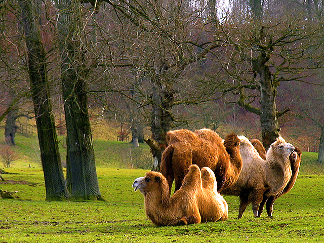 Camels at Longleat